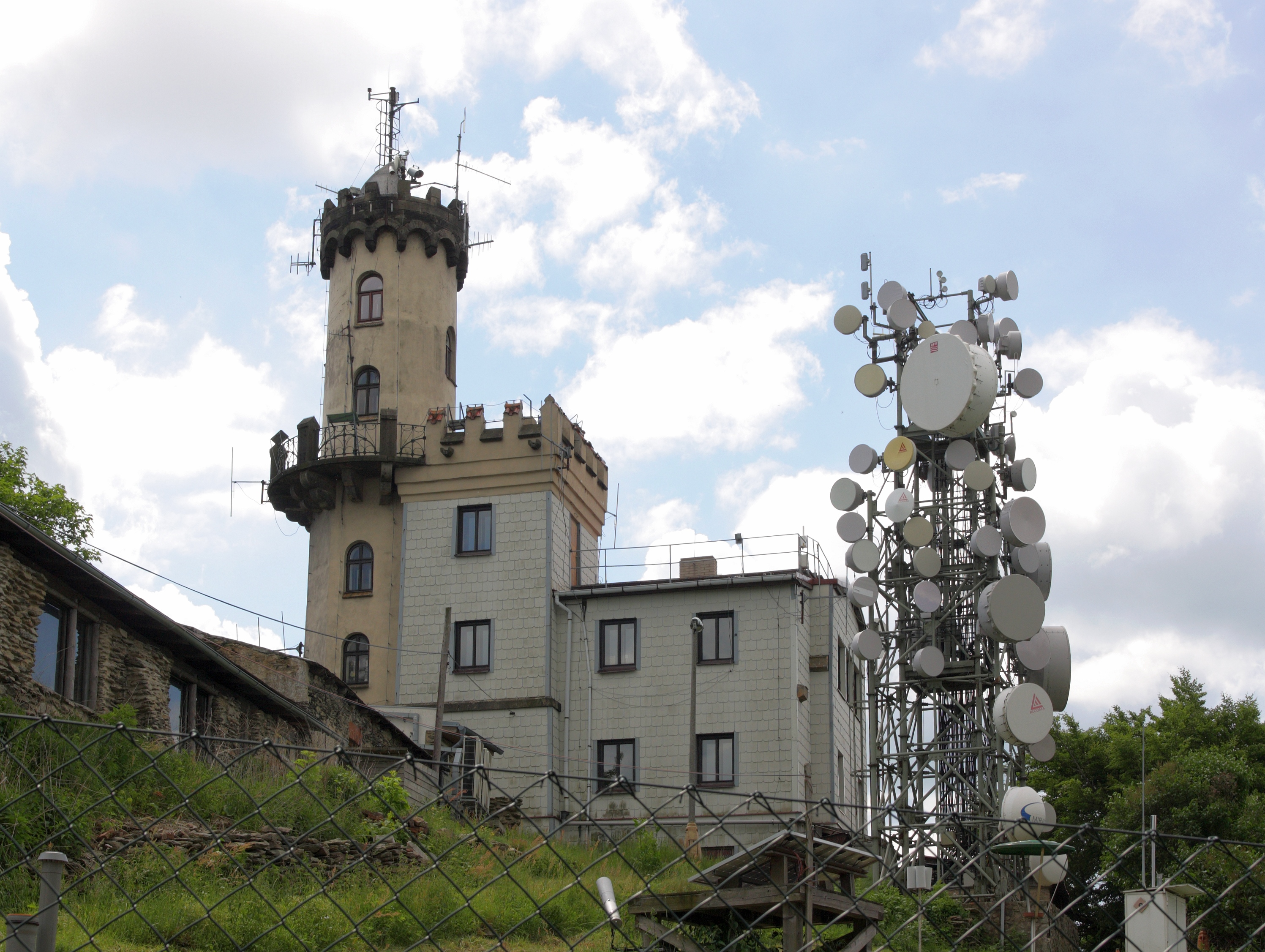 Milešovka - meteostanice a rozhledna.